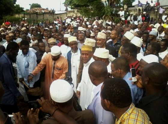 Kiswahili: Picha ya mazishi ya Sheikh Ilunga - huko Magomeni, Mapipa, Dar es Salaam.